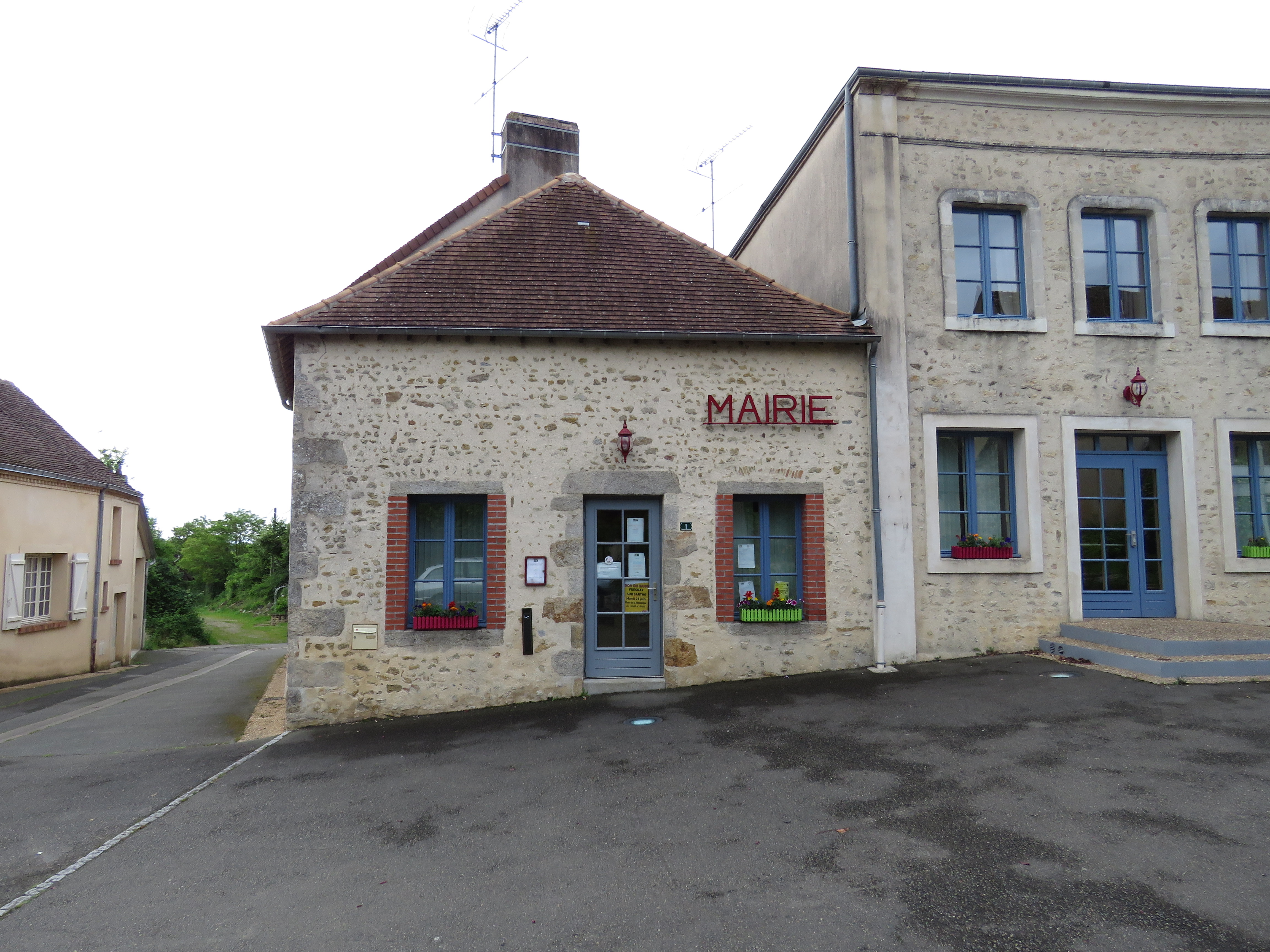 Mairie